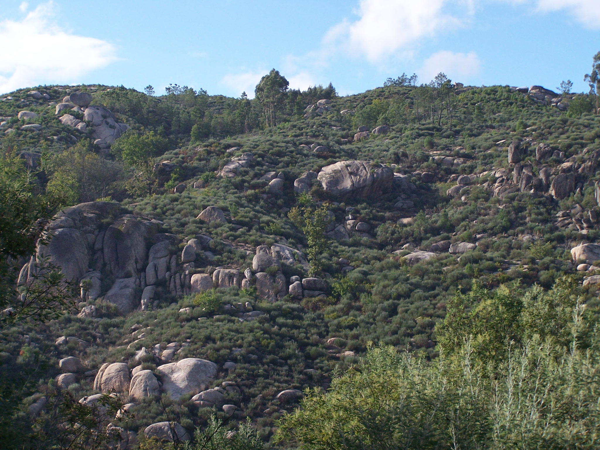 Vista a partir das Caldas da Cavaca, estância termal perto de Aguiar da Beira, Portugal.